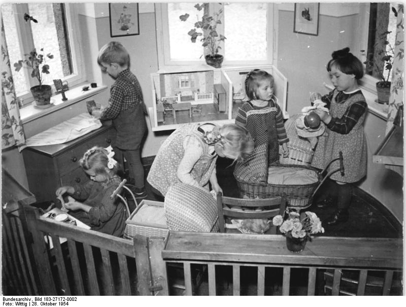 Bischleben, Blick in den Kindergarten Zentralbild TBD (Wittig) 2551 2 Motive 20.10.1954 Vorbildlicher Kindergarten auf dem Lande. In Erfurt-Bischleben wurde in einer ehemaligen Privatvilla eine vorbildliche Kindertagestätte eingerichtet. Unbesorgt können die Eltern ihrer Tätigkeit nachgehen, denn hier fühlen sich ihre Kinder wirklich wohl und sind gut aufgehoben. UBz: Die kleineren Kinder beschäftigen sich mit Puppen, Puppenwagen und Puppenstuben. -Blick in die Spielecke